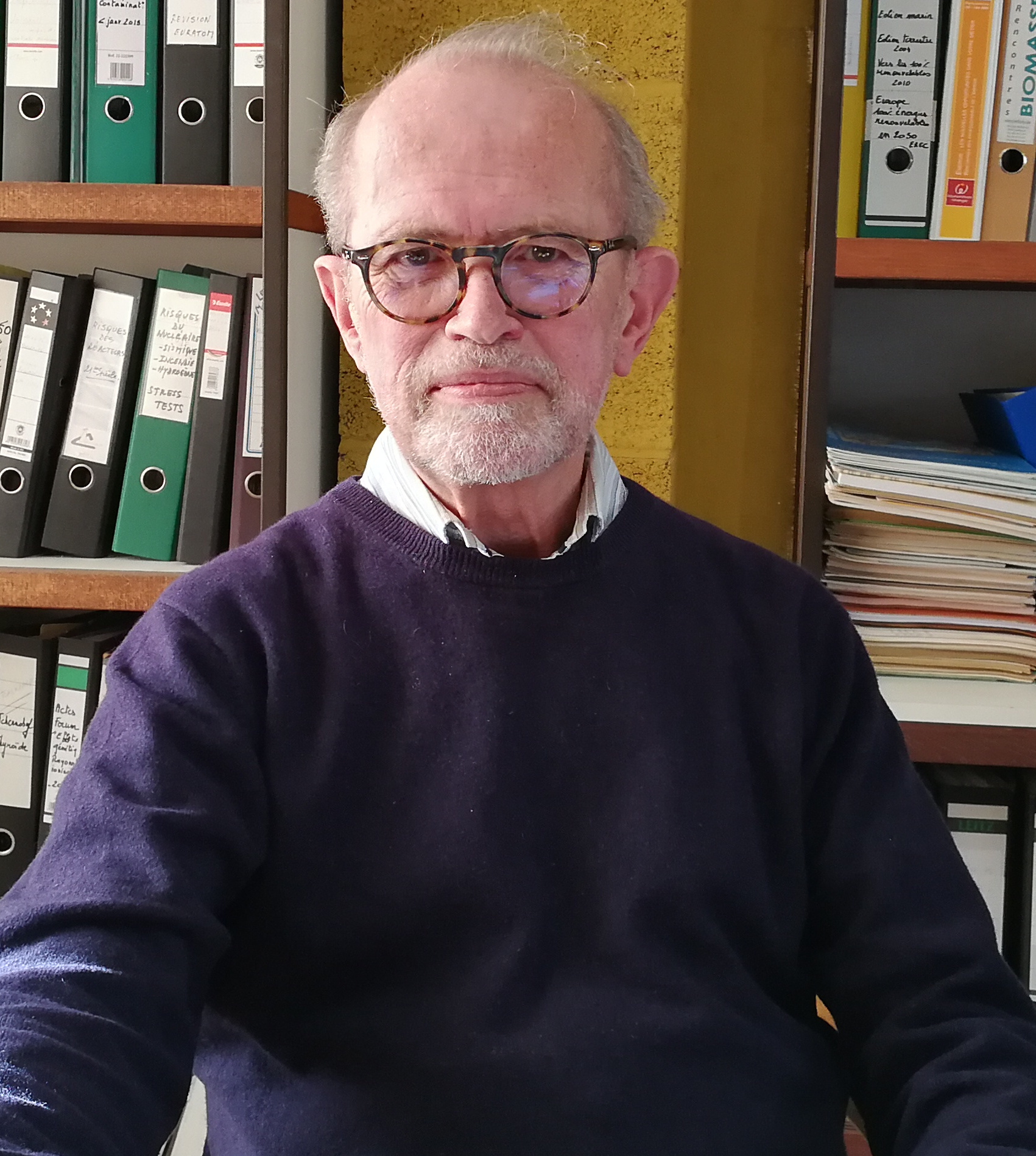 Paul Lannoye à son bureau du GRAPPE.